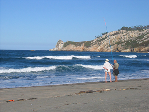 Pescadores en la orilla de la playa de Barayo Fotografo: Pablo García Carrera 2005